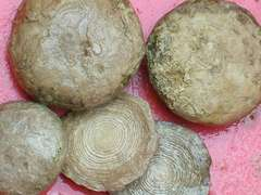 Szent László pénze (Magyarvalkó, Erdély)